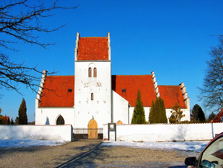 fra vest